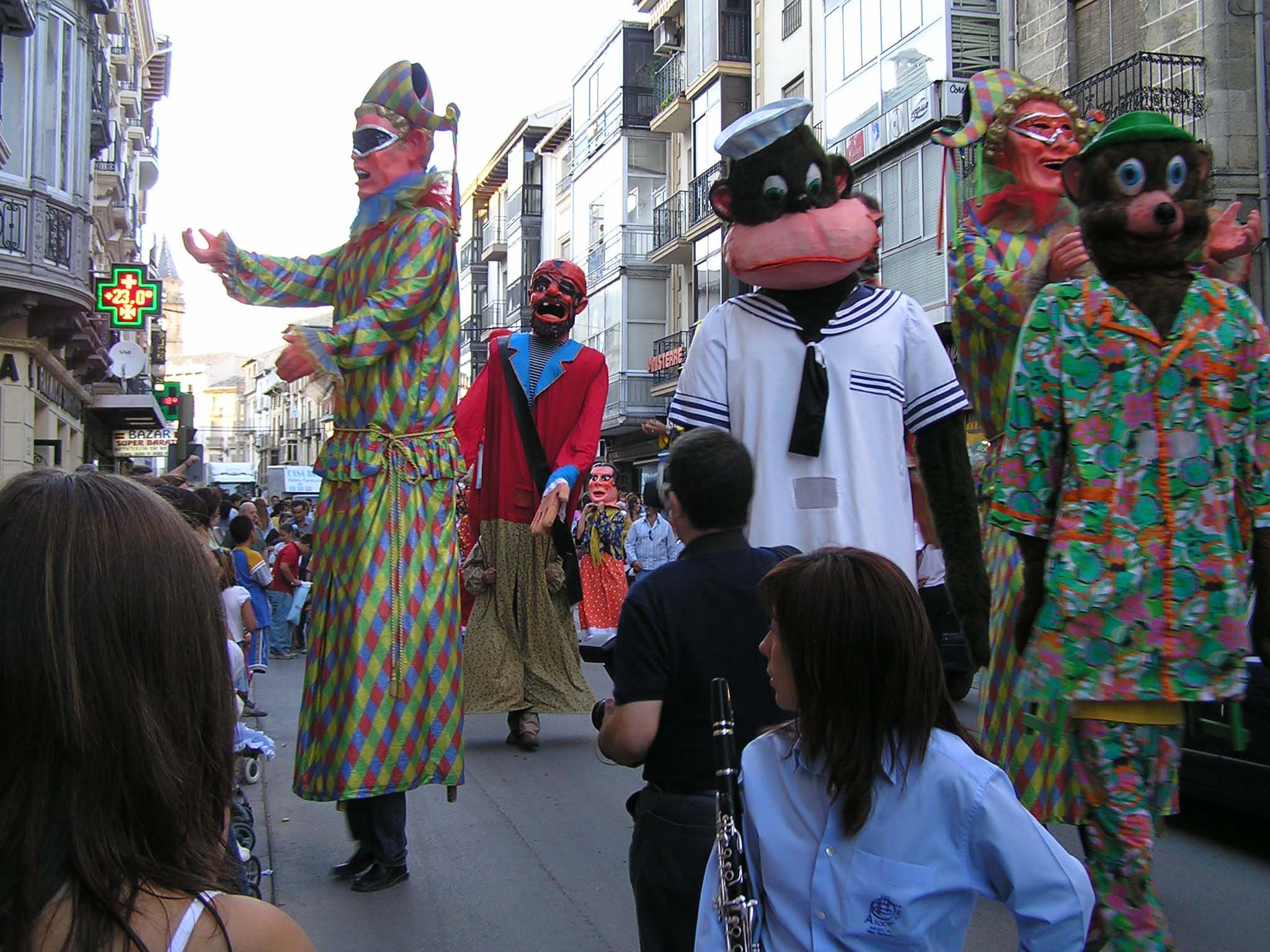 Desfile de gigantes y cabezudos en Alcalá la Real (Jaén, España)